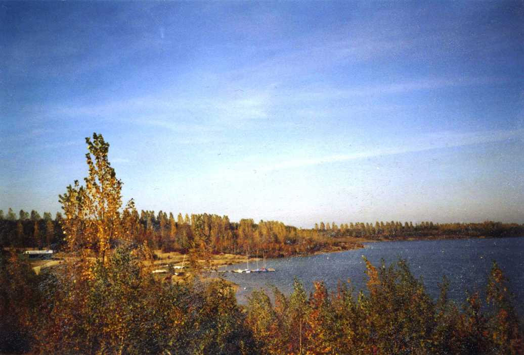 Westufer des Blausteinsees bei Eschweiler in Nordrhein-Westfalen, Deutschland